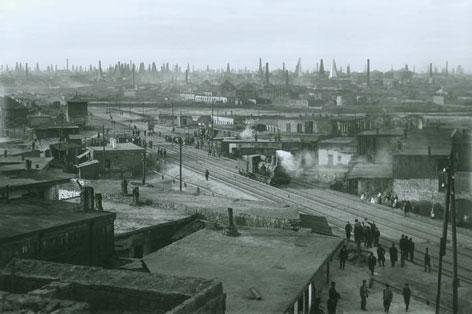 Черный город. Вид на нефтяные промыслы. Фото К.Буллы 1905г.